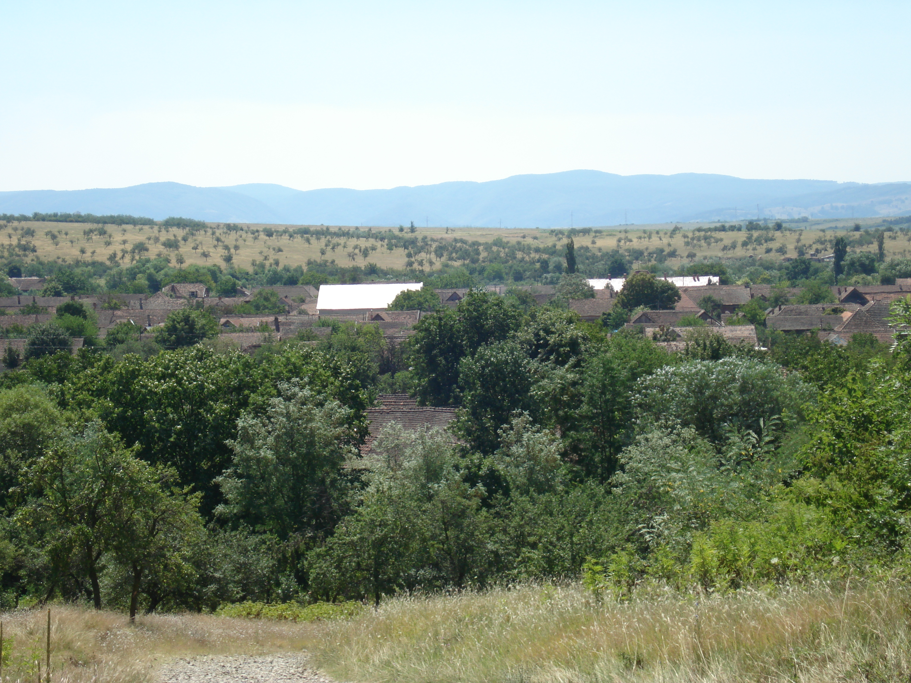 Răcășdia village, Caraș-Severin county, Romania